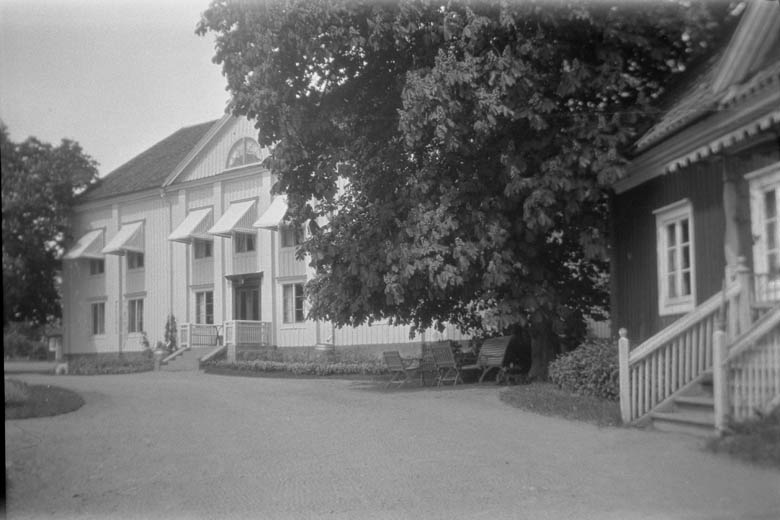 Motiv: Skälby säteri Kategori: SäteriSkälby säteri.